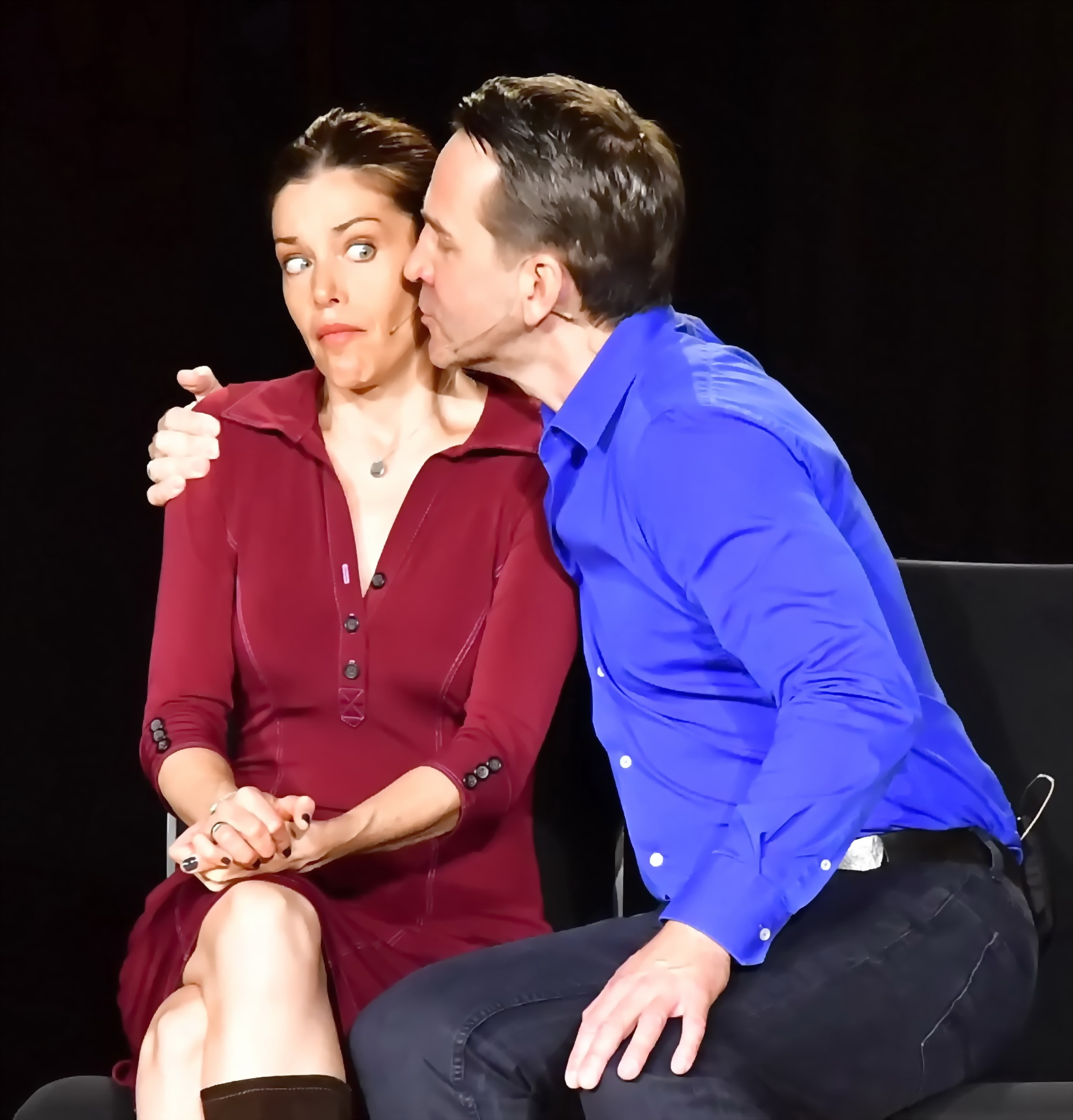 Jennifer und Michael Ehnert, Zweikampfhasen 2017